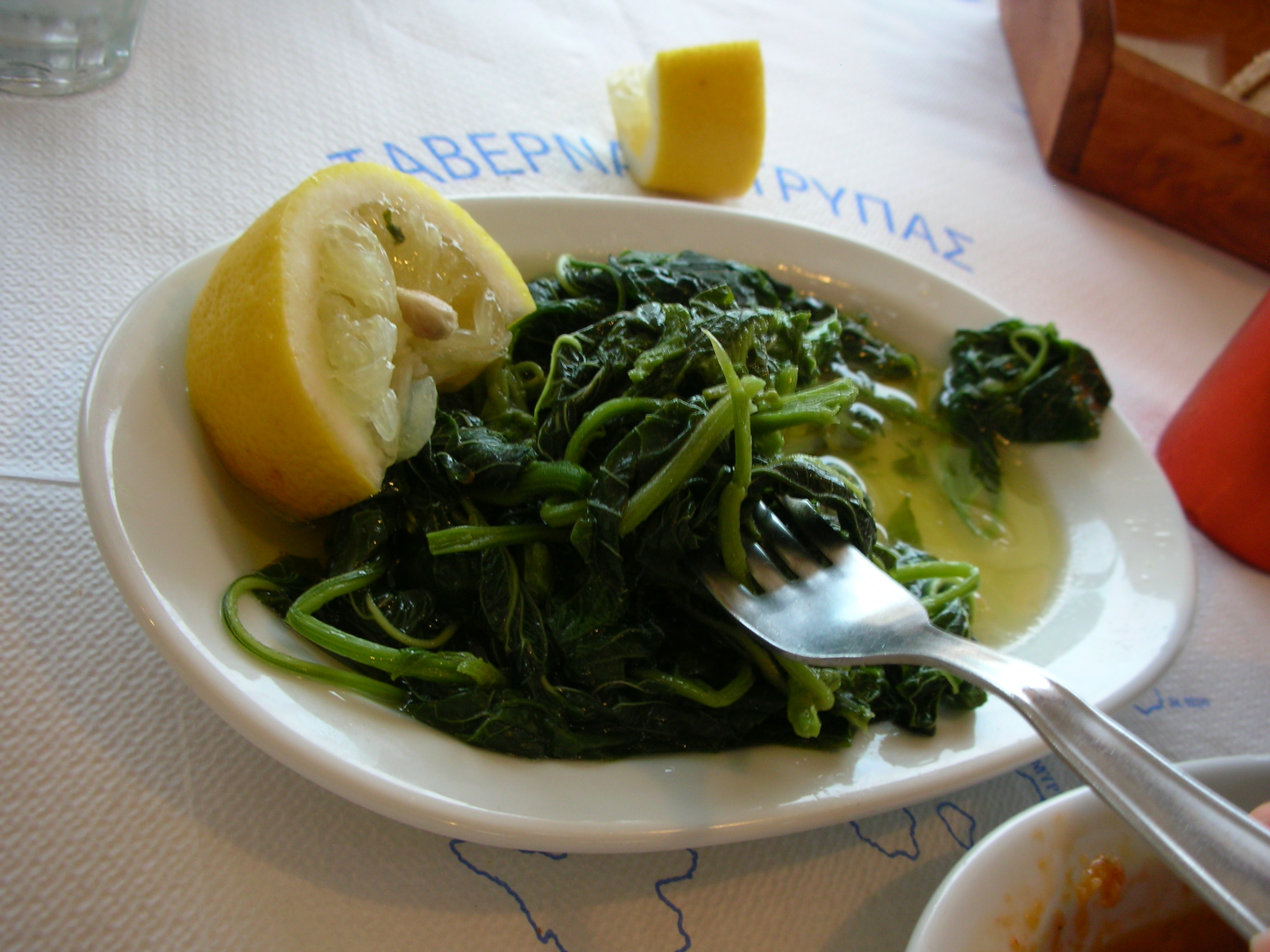 Chorta_Vlita (Arki)